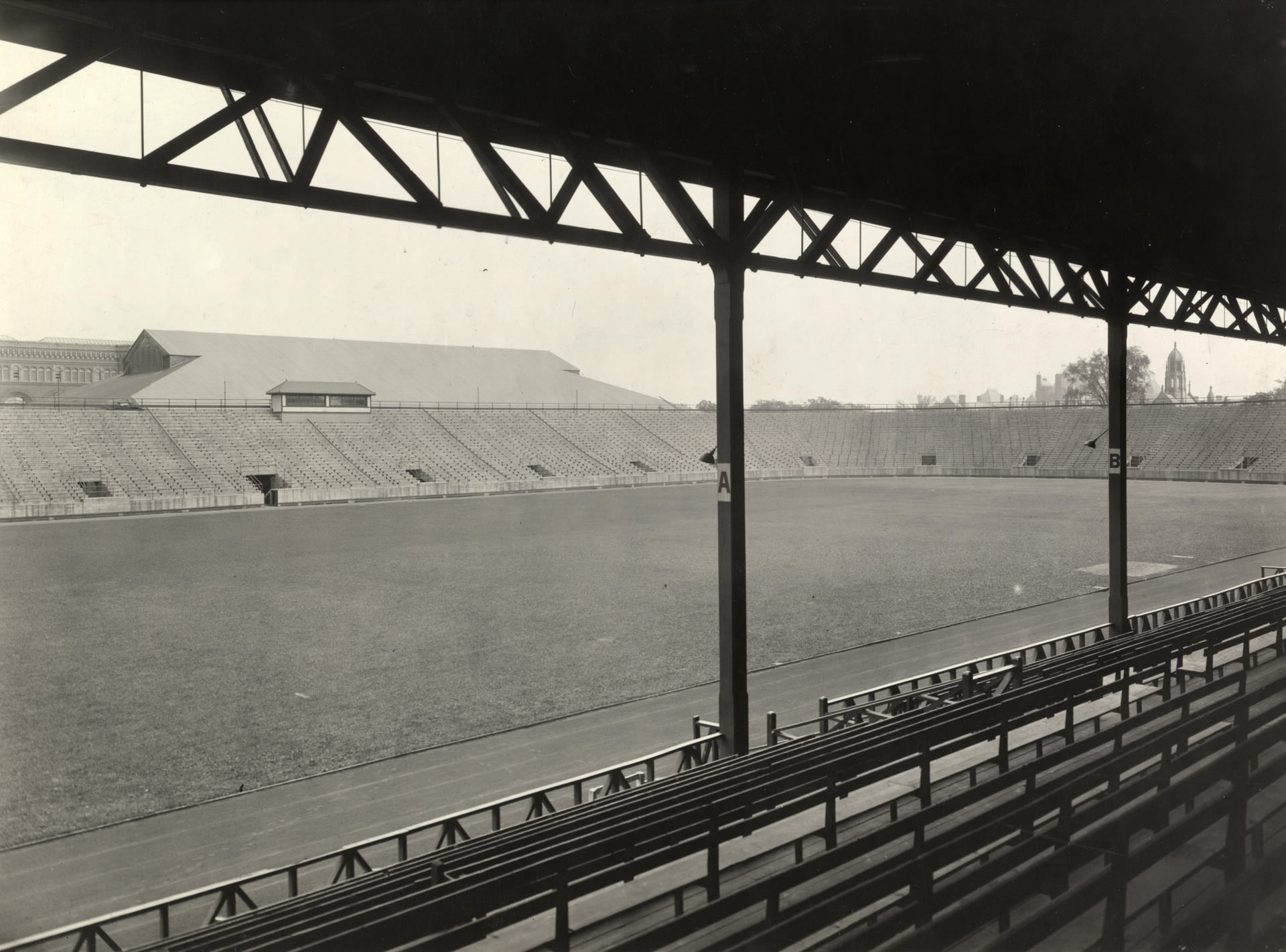 Foto del Varsity Stadium prima della demolizione e ricostruzione del 2001